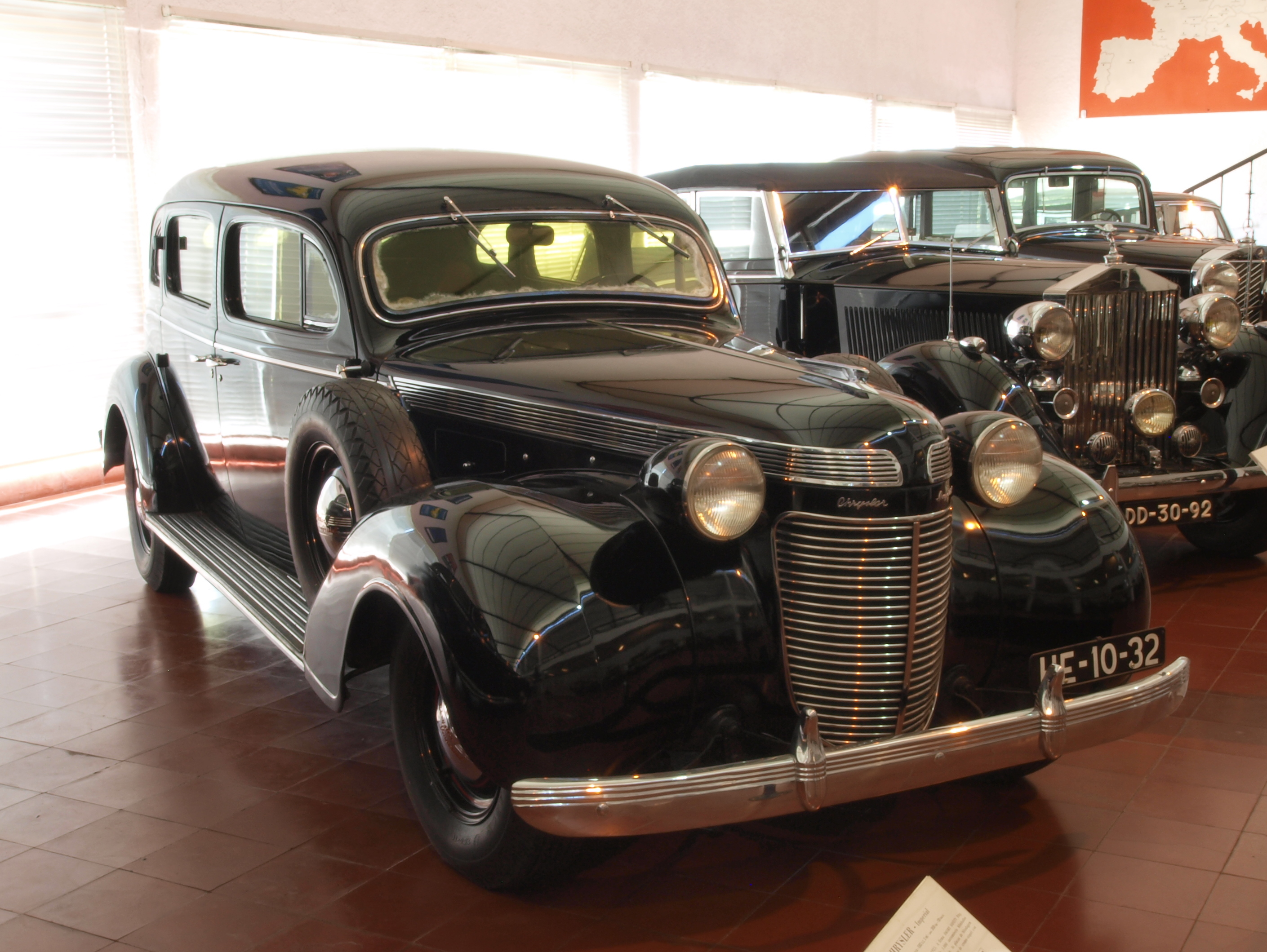 Photographed at the Caramulo museum, 'Museu do Caramulo', Caramulo, Portugal. OLYMPUS DIGITAL CAMERA